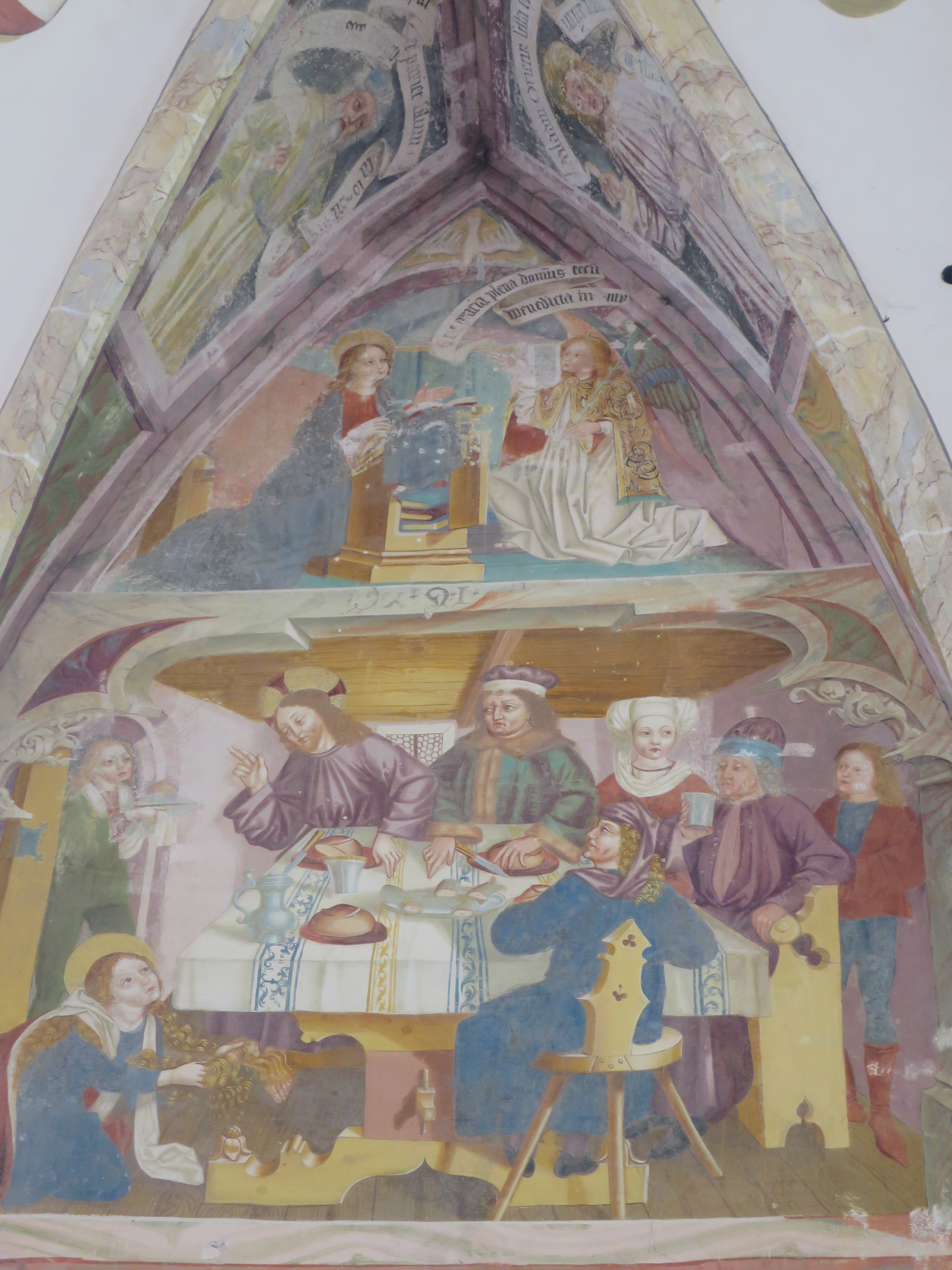 Fresko im Altarraum Mitte von Simon v. Taisten. Oben die Verkündigung, unten das Gastmahl des Pharisäers. In den Zwickeln Isaias und Balaam.